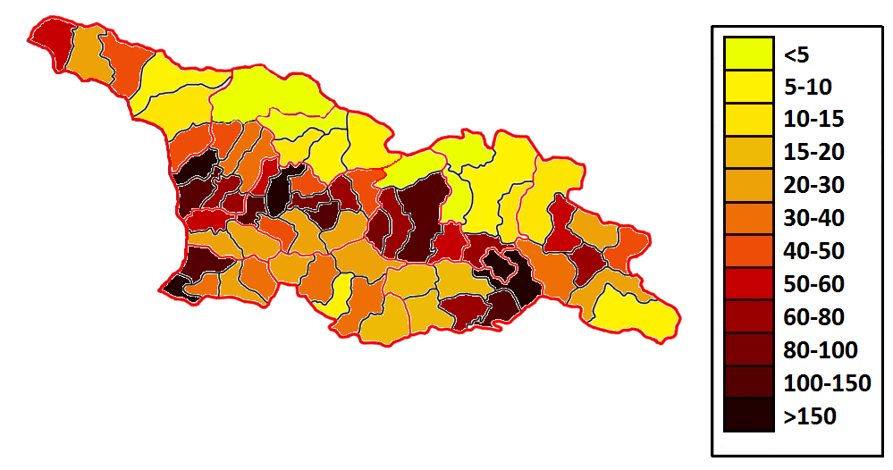 Плотность населения Грузии 2016 г. Данные по территориям, неподконтрольным Грузии взяты из переписей частично признанных республик Абхазия и Южная Осетия. Города, находящиеся между районов умышлено присоединялись к одному из них на усмотрение автора.